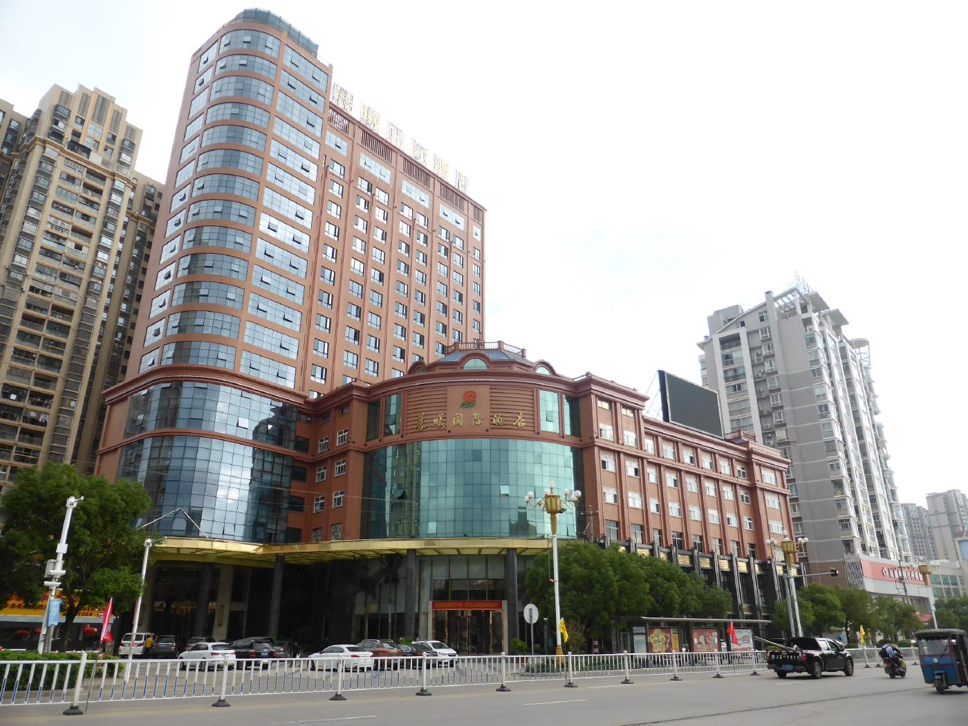 福寧長距離バスターミナルから徒歩3分の四星級ホテルである晨曦国際酒店。中華人民共和国福建省寧徳市霞浦県にある施設。